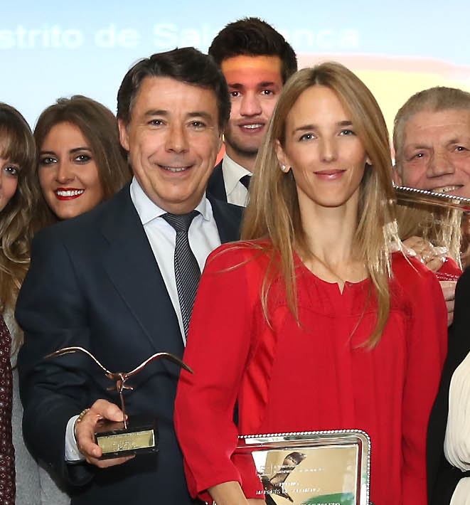 CENA PP DISTRITO SALAMANCA